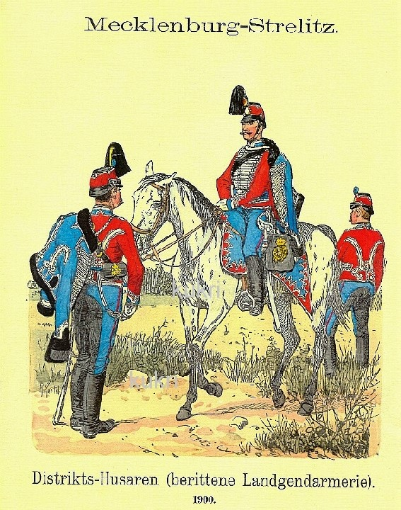 Mecklenburg-Strelitz Distriks-Husaren um 1900. Abbildung aus Richard Knötel, Uniformkunde. Band IV. Blatt No. 4. Die Husaren-Uniform wurde bis 1905 von allen Gendarmen und danach nur noch beim Hofdienst getragen. Ab 1905 Neu-Uniformierung im Stil der preußischen Landgendarmerie.